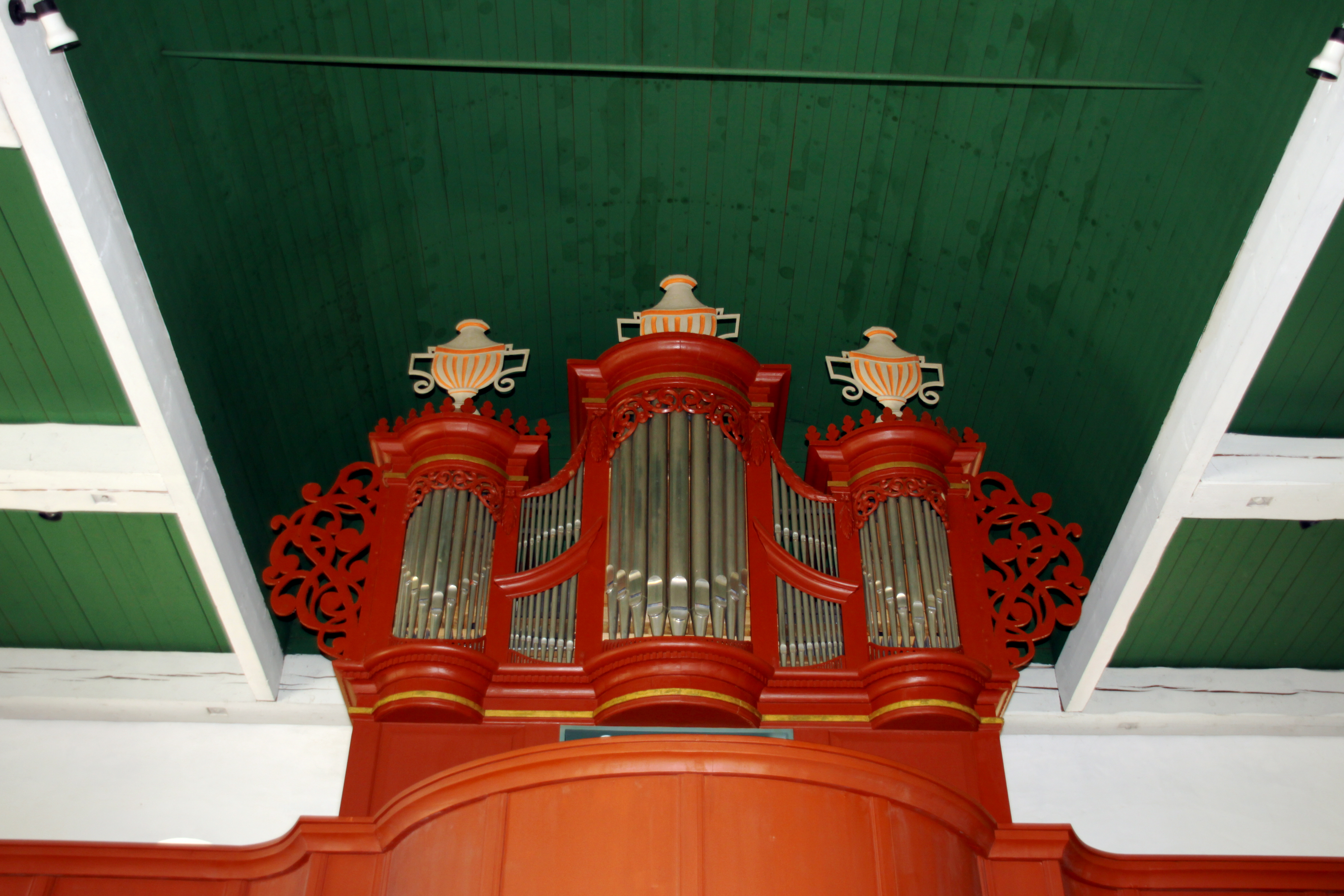 Orgel der Wibadi-Kirche